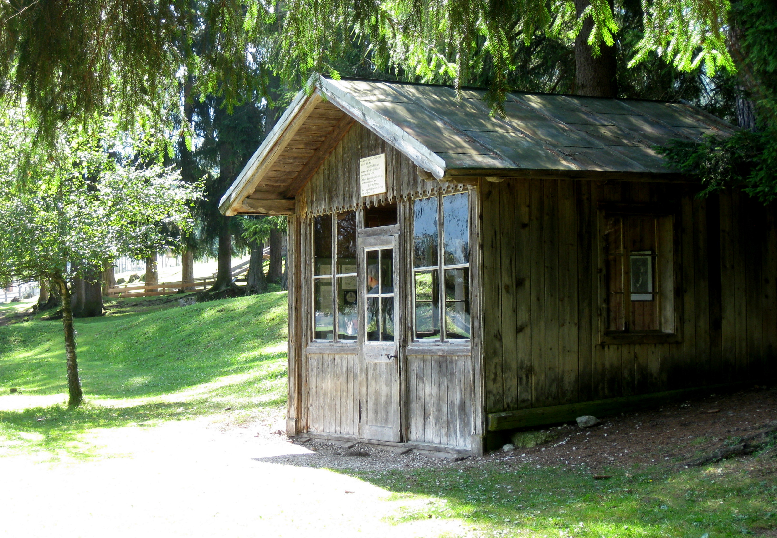 Dieses Komponierhäuschen liess sich Gustav Mahler in 'Toblach (Ortsteil Altschluderbach) bauen, wo er 1908 bis 1910 den Sommer verbrachte und u.a. die 9.Sinfonie komponierte.